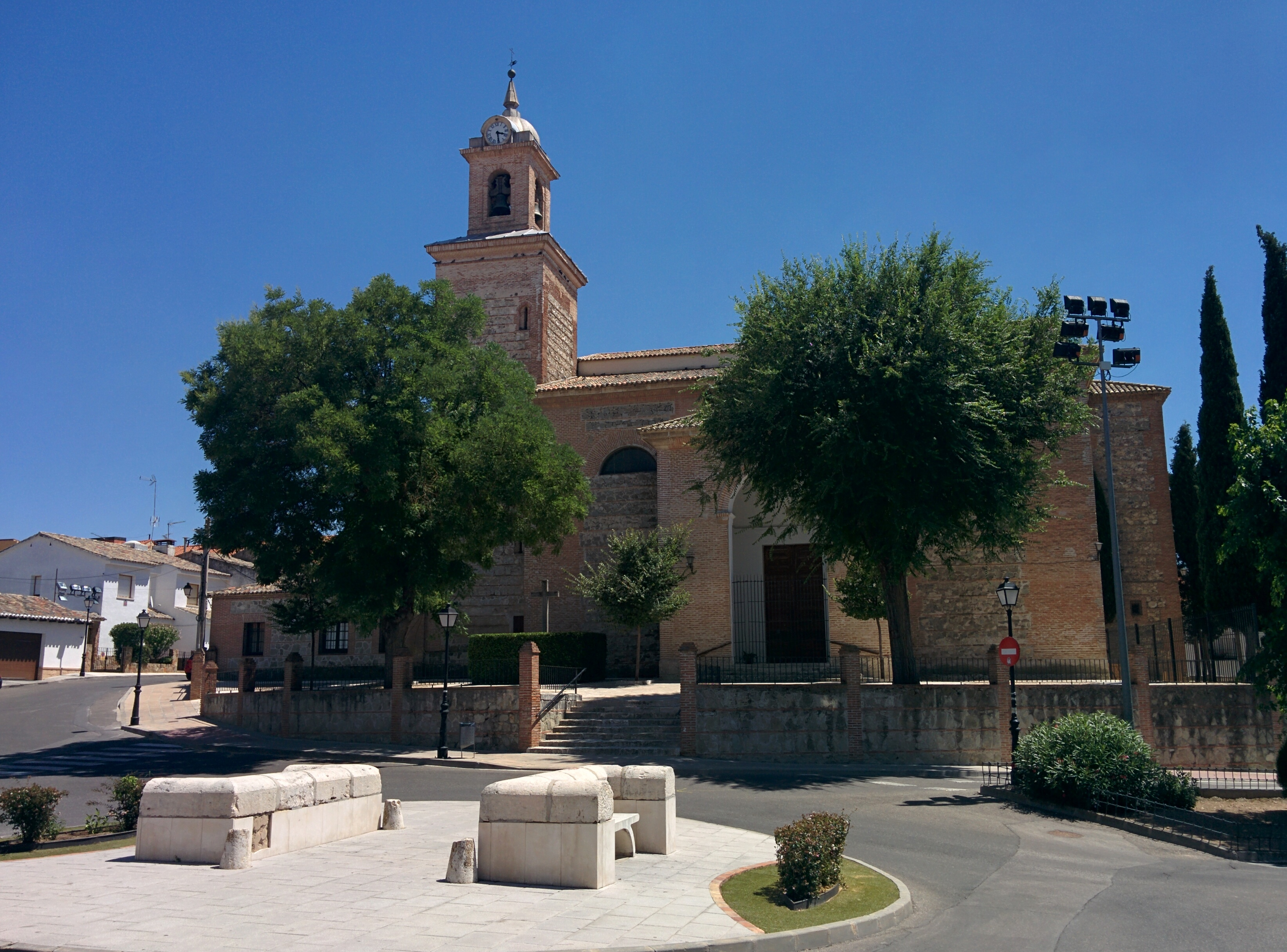 Iglesia de Nuestra Señora de la Asunción, en Esquivias (Toledo, España).